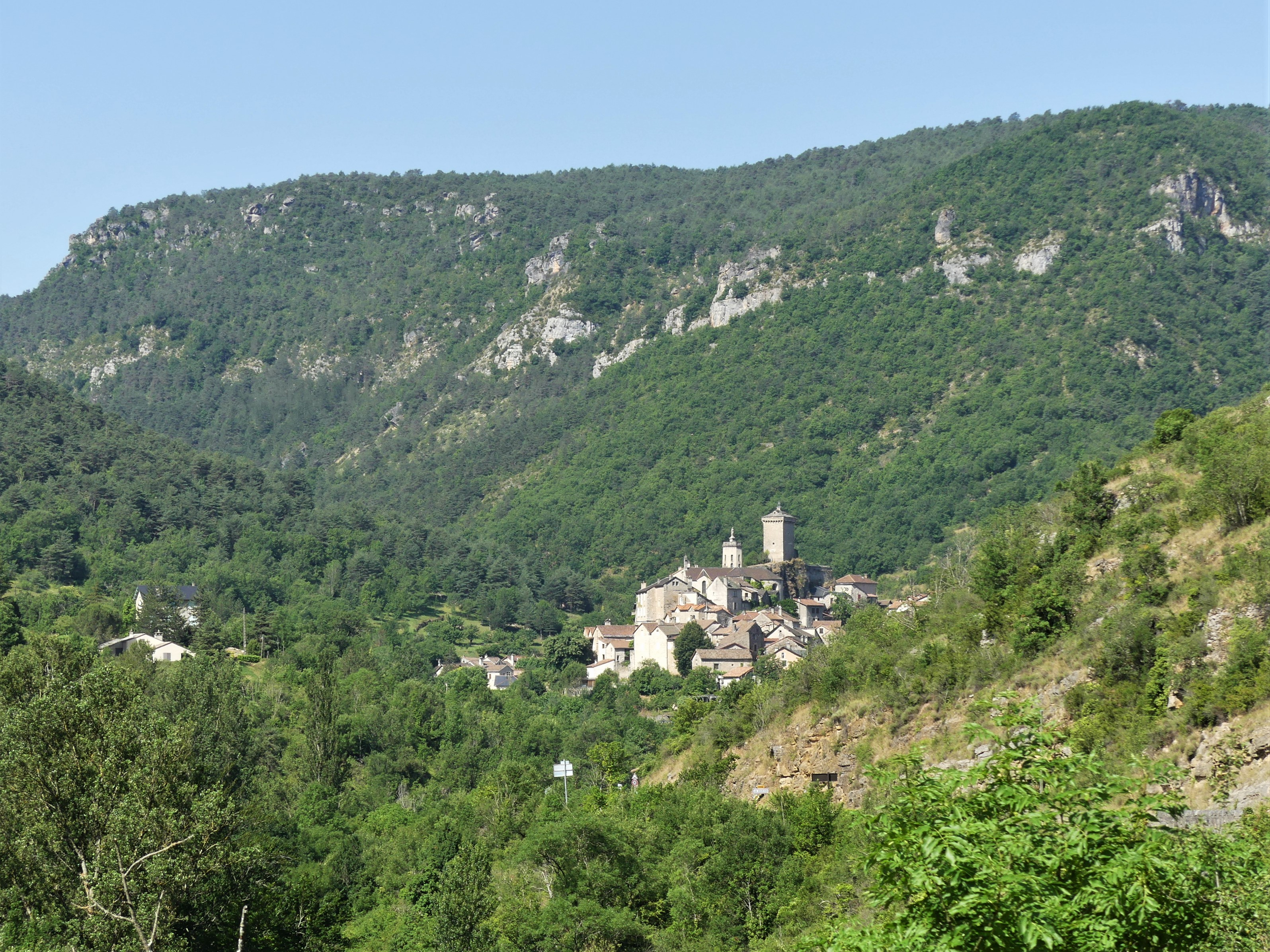 Le bourg de Peyreleau (Aveyron) vu depuis la route départementale 996 (commune du Rozier, Lozère).